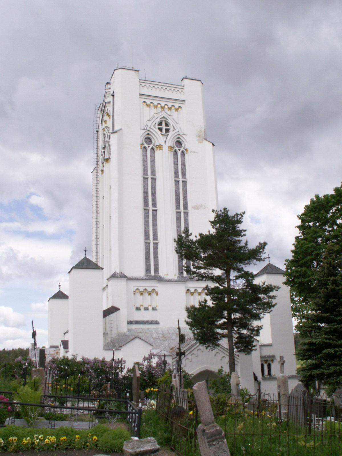 Kapelle in Siluva